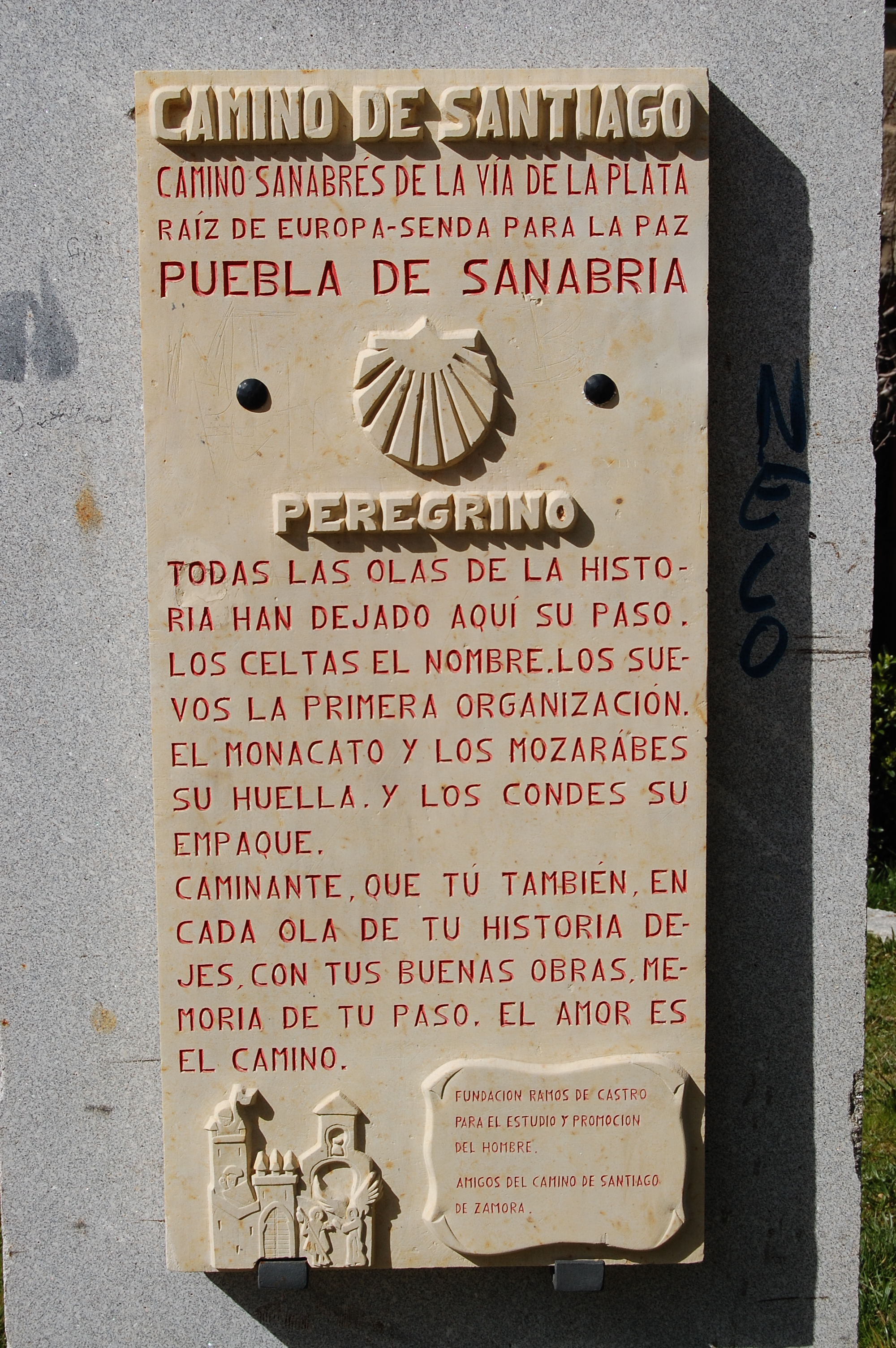 Puebla de Sanabria (Póvoa de Seabra), província de Zamora, Espanha.